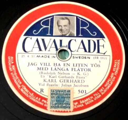 Skivetikett Cavalcade